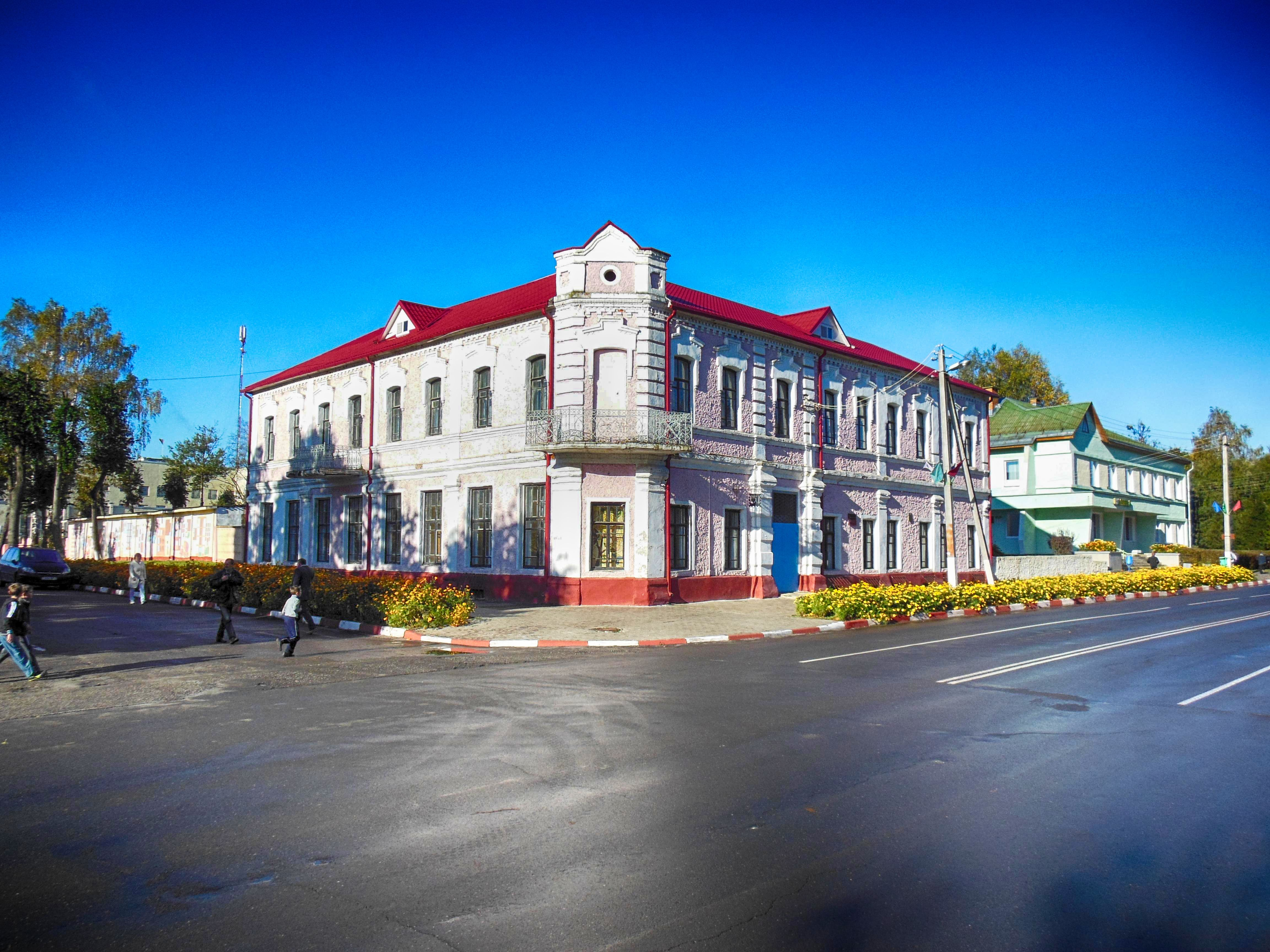 Беларуская (тарашкевіца): Мсьціслаў, земская ўправа